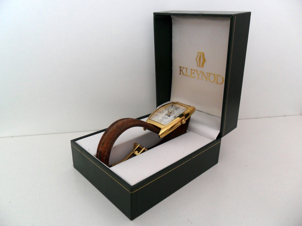 Наручные часы "KLEYNOD" Киевского часового завода.